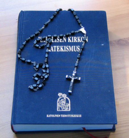 Katolisen kirkon katekismus ja ruusukko. Rosary.